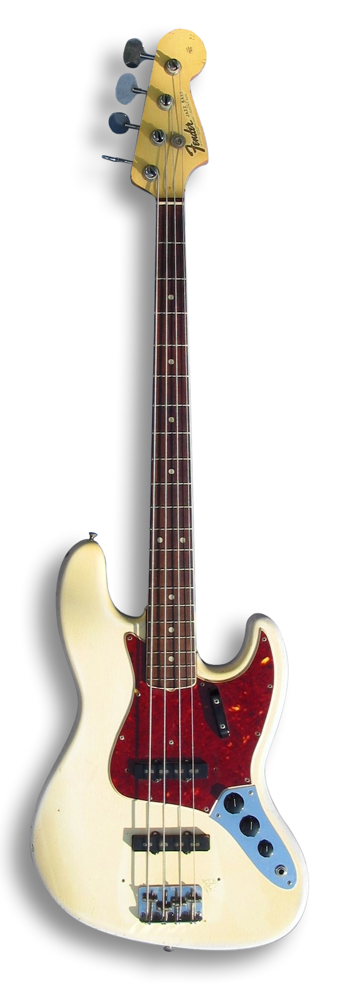 Fender Jazz Bass from 1966 in Olympic white with the "transition" fingerboard (Bindings and Dot Inlays)